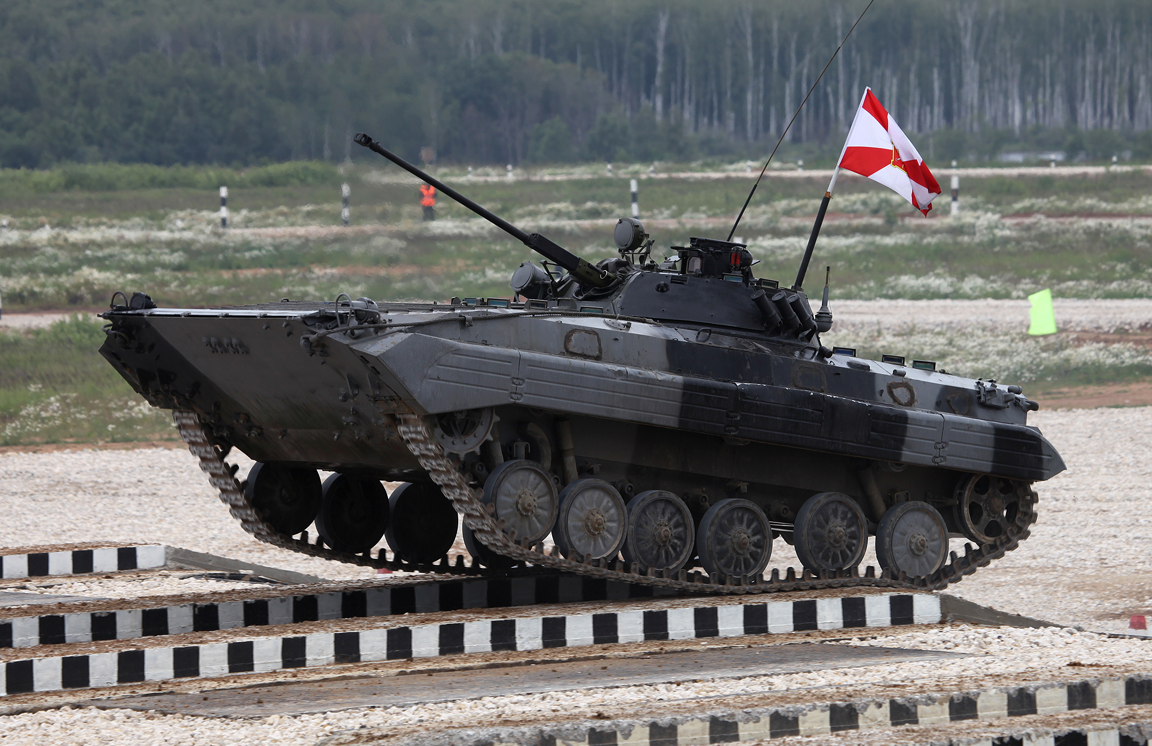 БМП-2